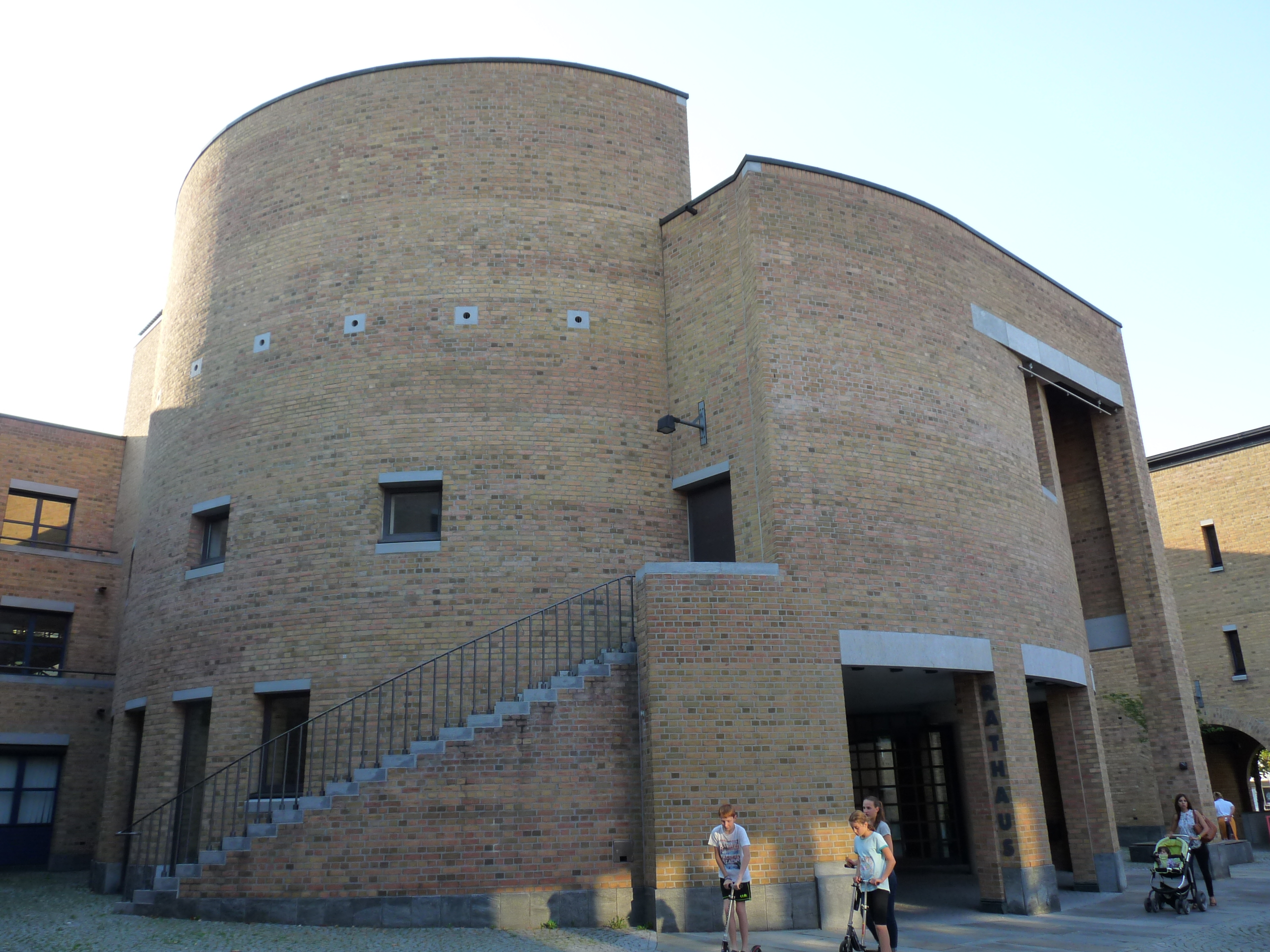 Fellbach - Rathaus